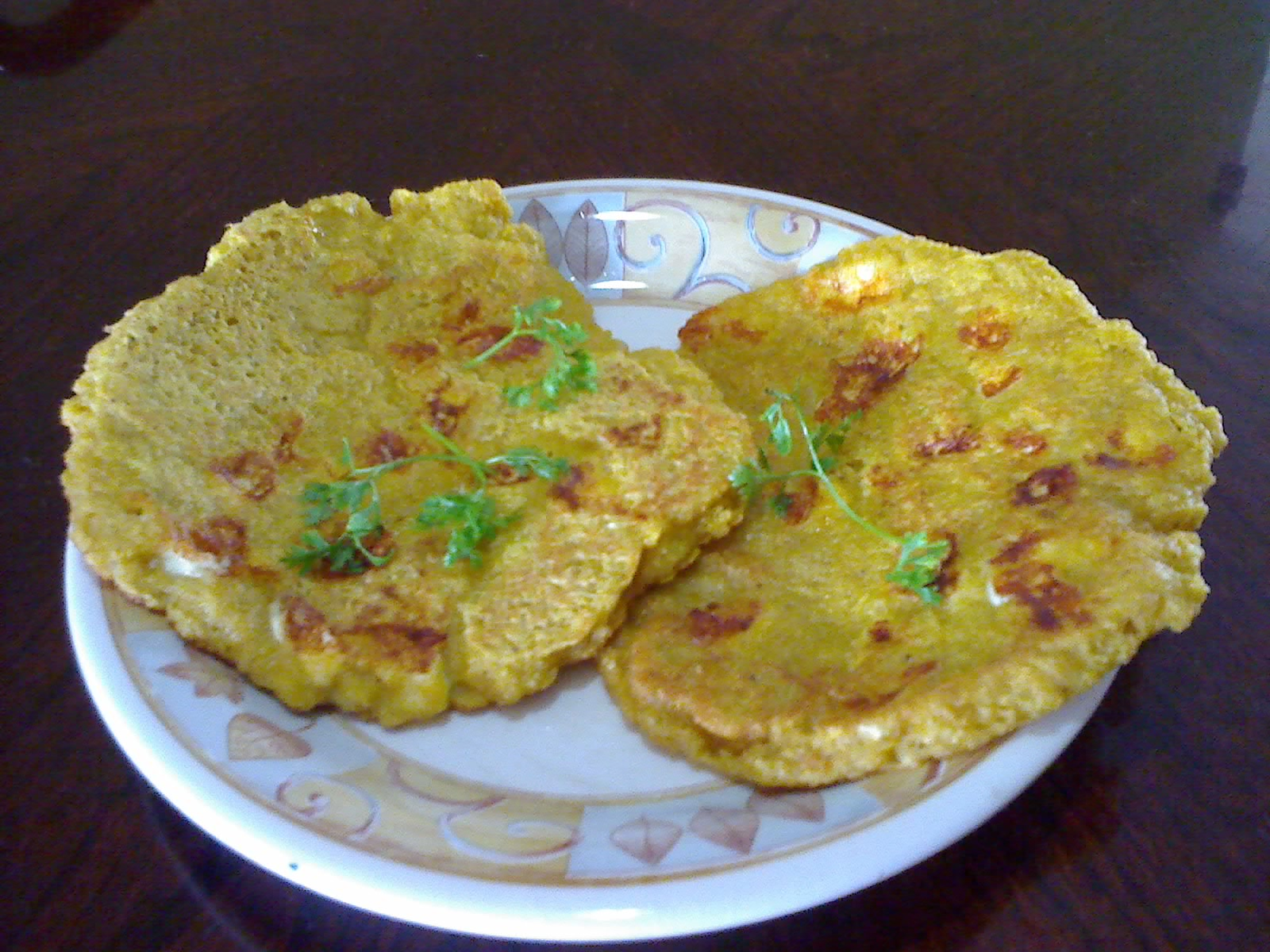 Las llamadas tortitas, tortas o tortillas de plátano son muy comunes en la costa ecuatoriana principalmente en la zona norte de la provincia de Manabí